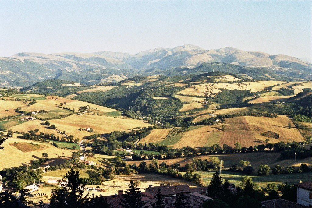 Il Palazzo Ducale è un monumento rinascimentale della città di Camerino, nelle Marche. Sede dell'Università degli Studi di Camerino. This is a photo of a monument which is part of cultural heritage of Italy.